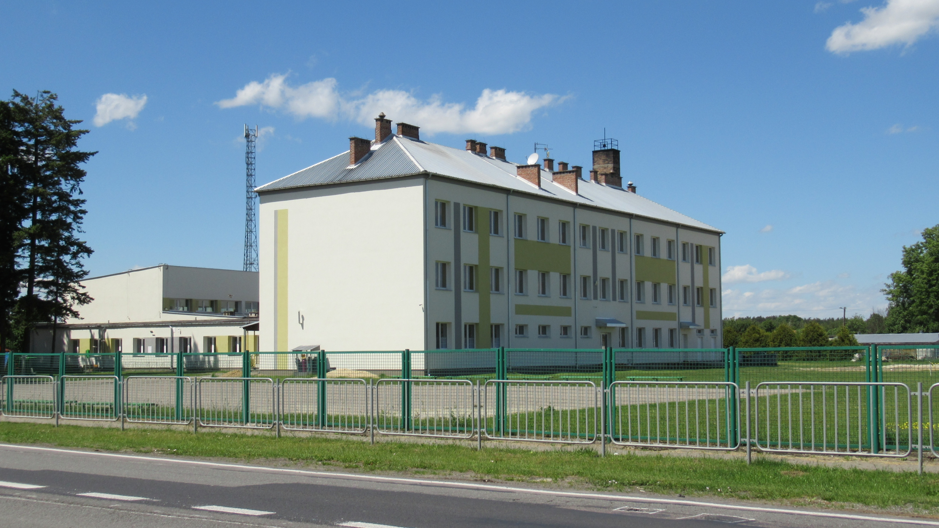 Trzebieszów (pow. łukowski, woj. lubelskie, Polska). Szkoła podstawowa.